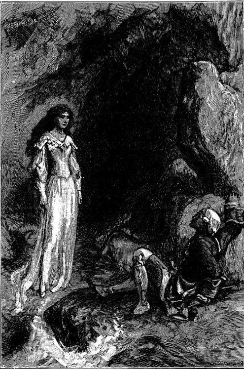 Illustration d'ouverture du conte La fée des Houles, collecté par Paul Sébillot, publié en 1883 dans les Contes de terre et de mer.